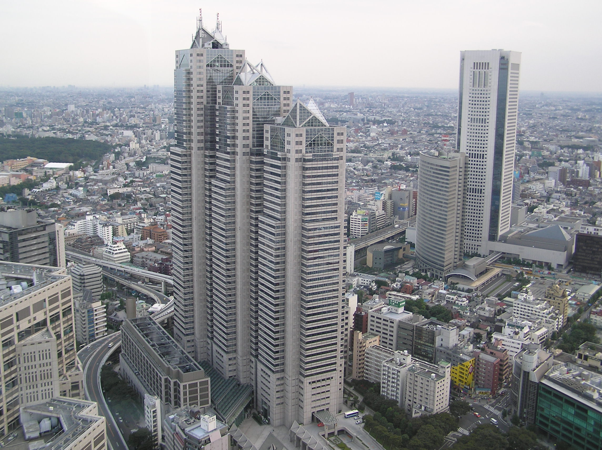 Shinjuku Park Tower